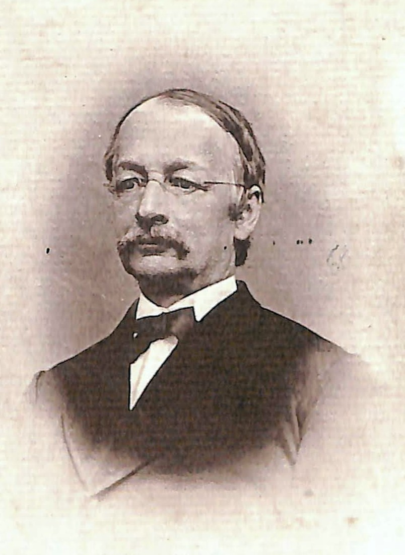 Original hergestellt durch Friedrich Wilde Görlitz (1824 - 1914).